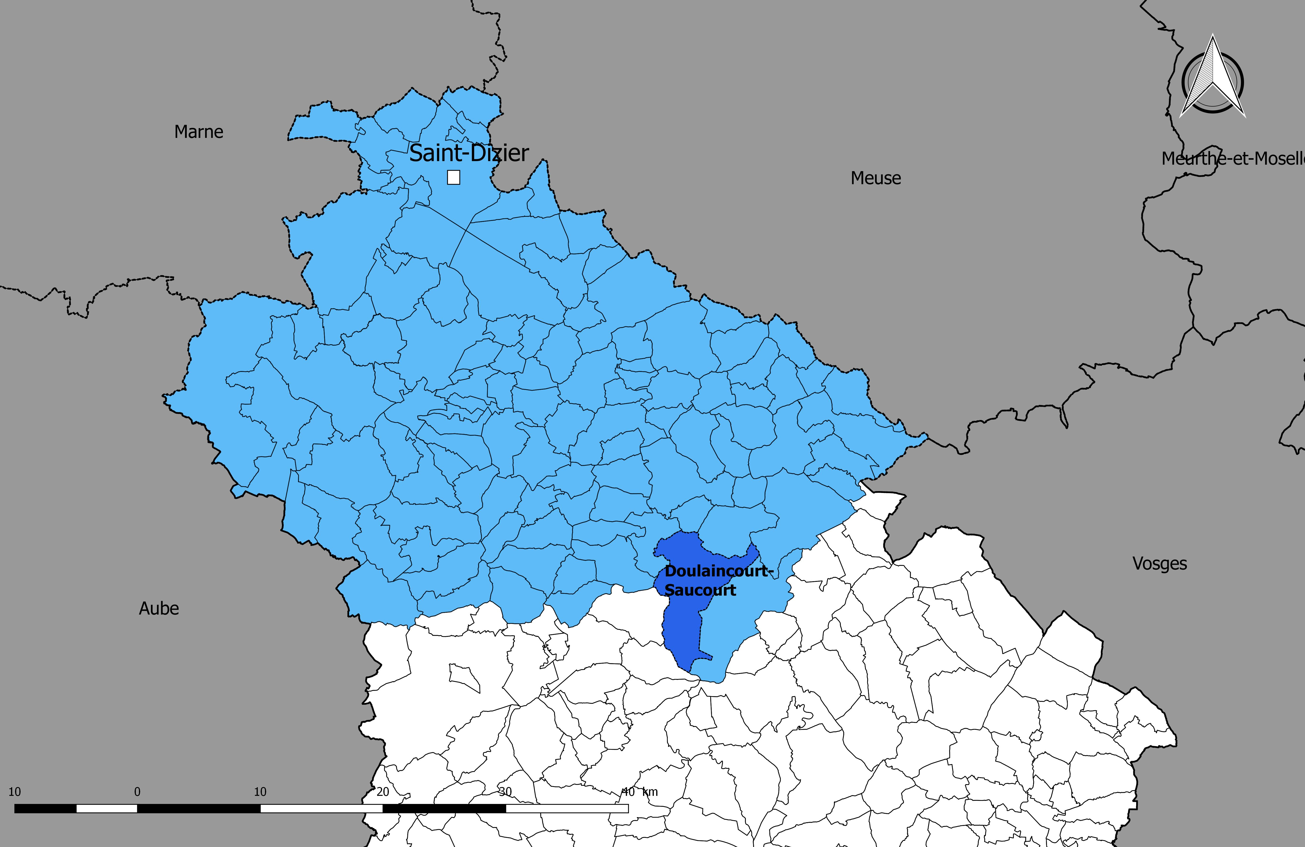 Localisation de la commune de Doulaincourt-Saucourt dans l'arrondissement de Saint-Dizier.